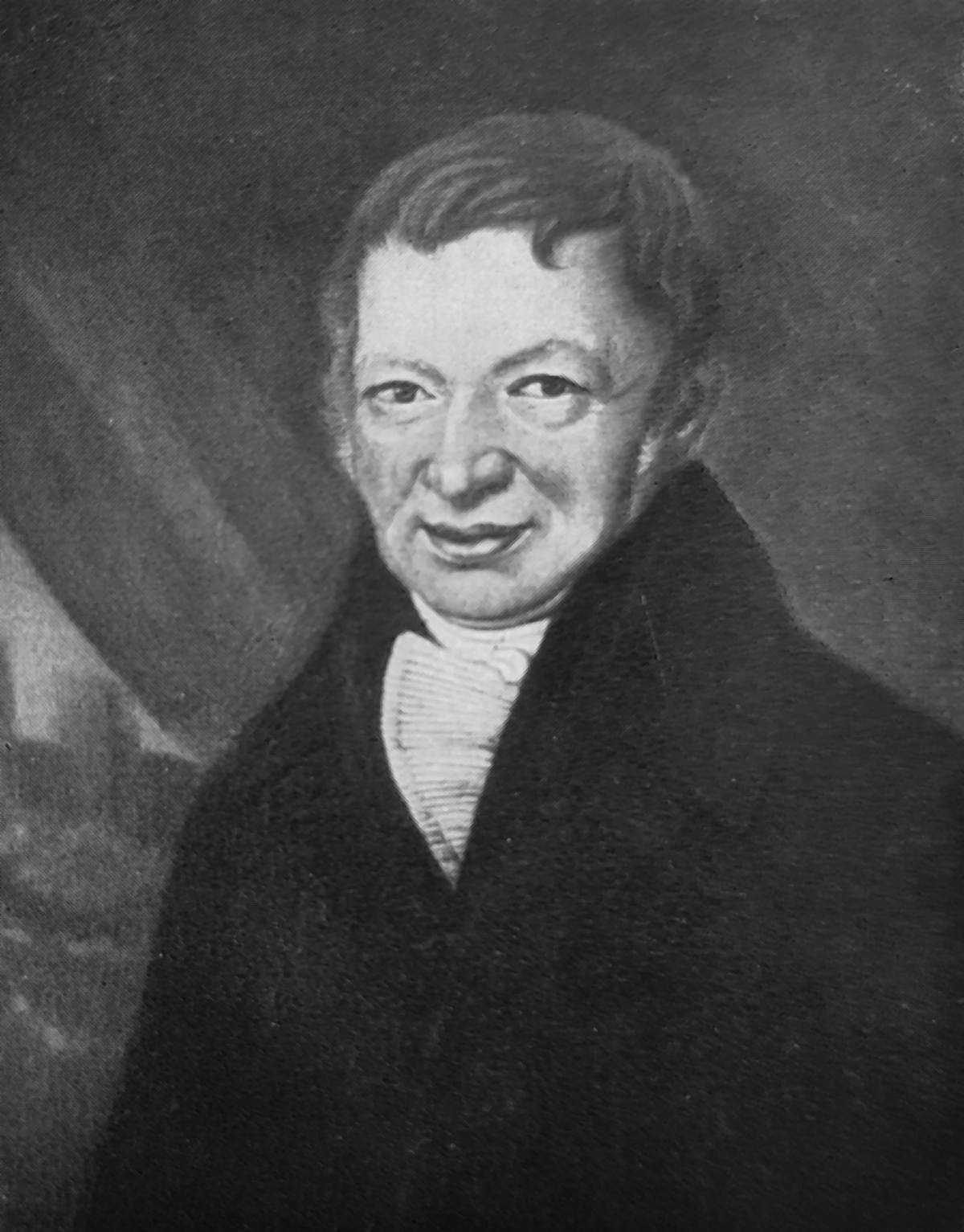 Leinenkaufmann und Ratsmitglied in Bielefeld